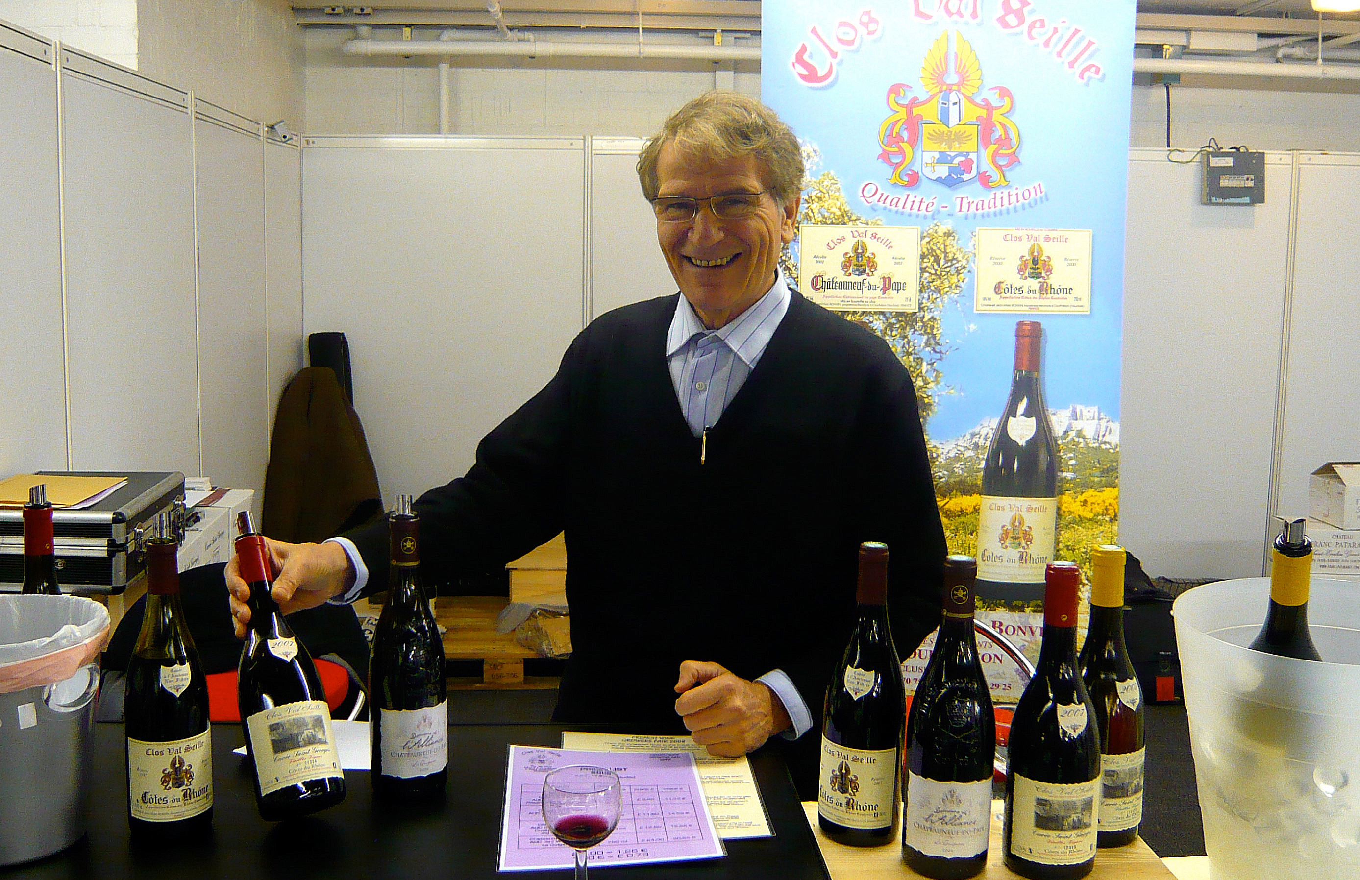 Stand de dégustation du Clos de Val-Seille au Barbican